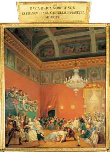 Presa dalla versione piemontese.